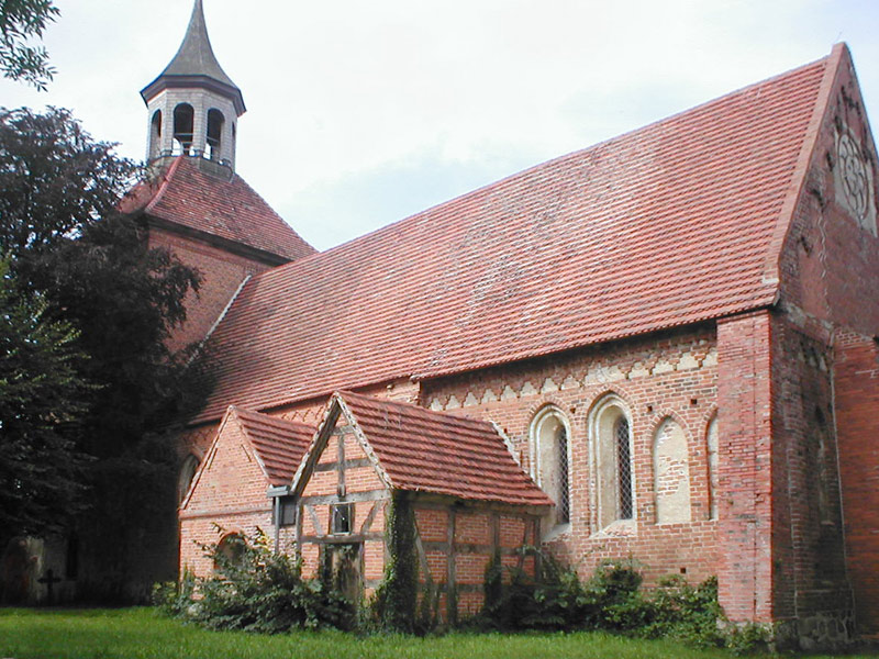 Südansicht der Kirche in Neukalen-Schorrentin, Mecklenburg-Vorpommern, Deutschland